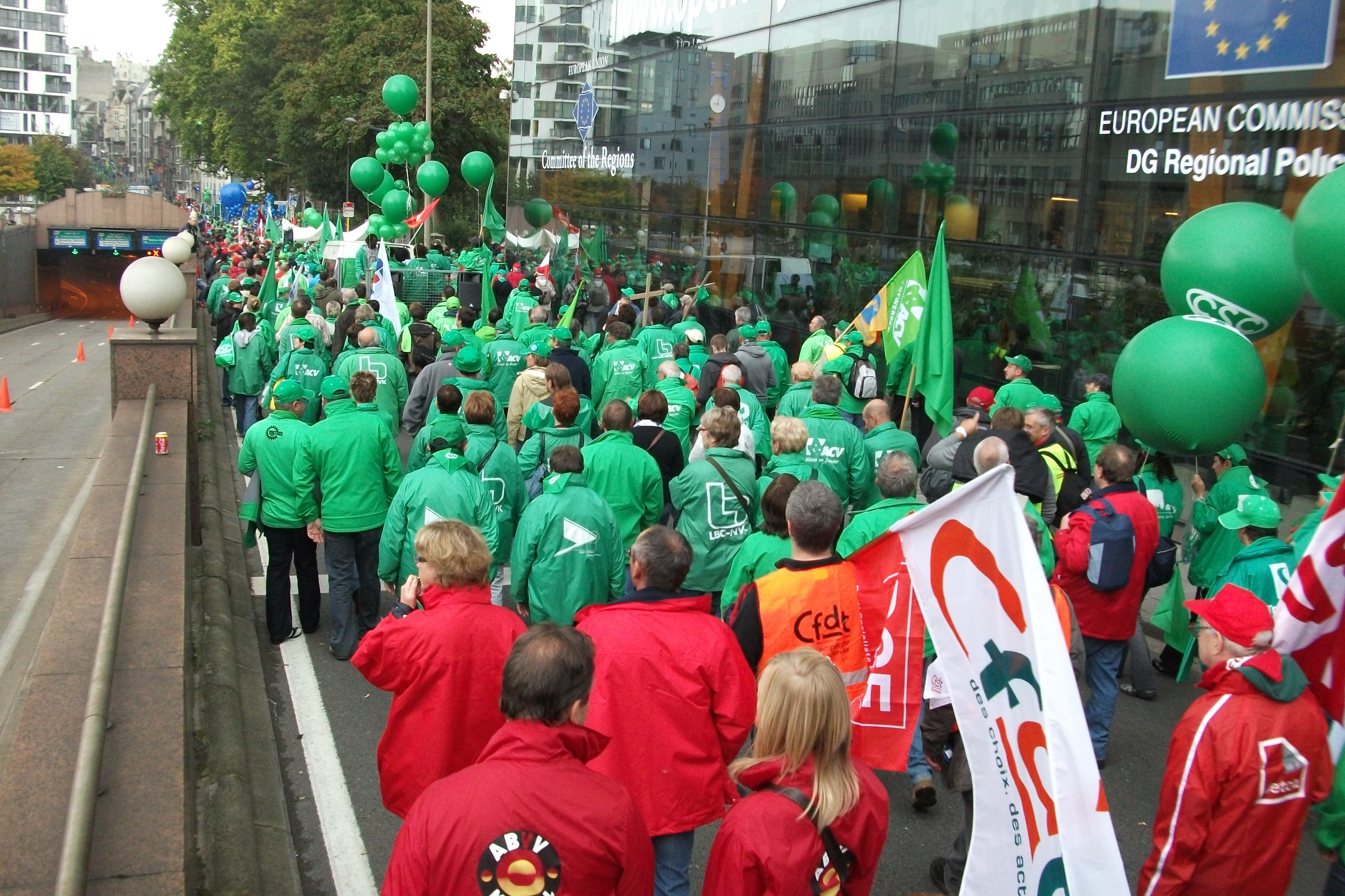 CFDT, CSC et FGTB, syndicats manifestant à Bruxelles en 2010.